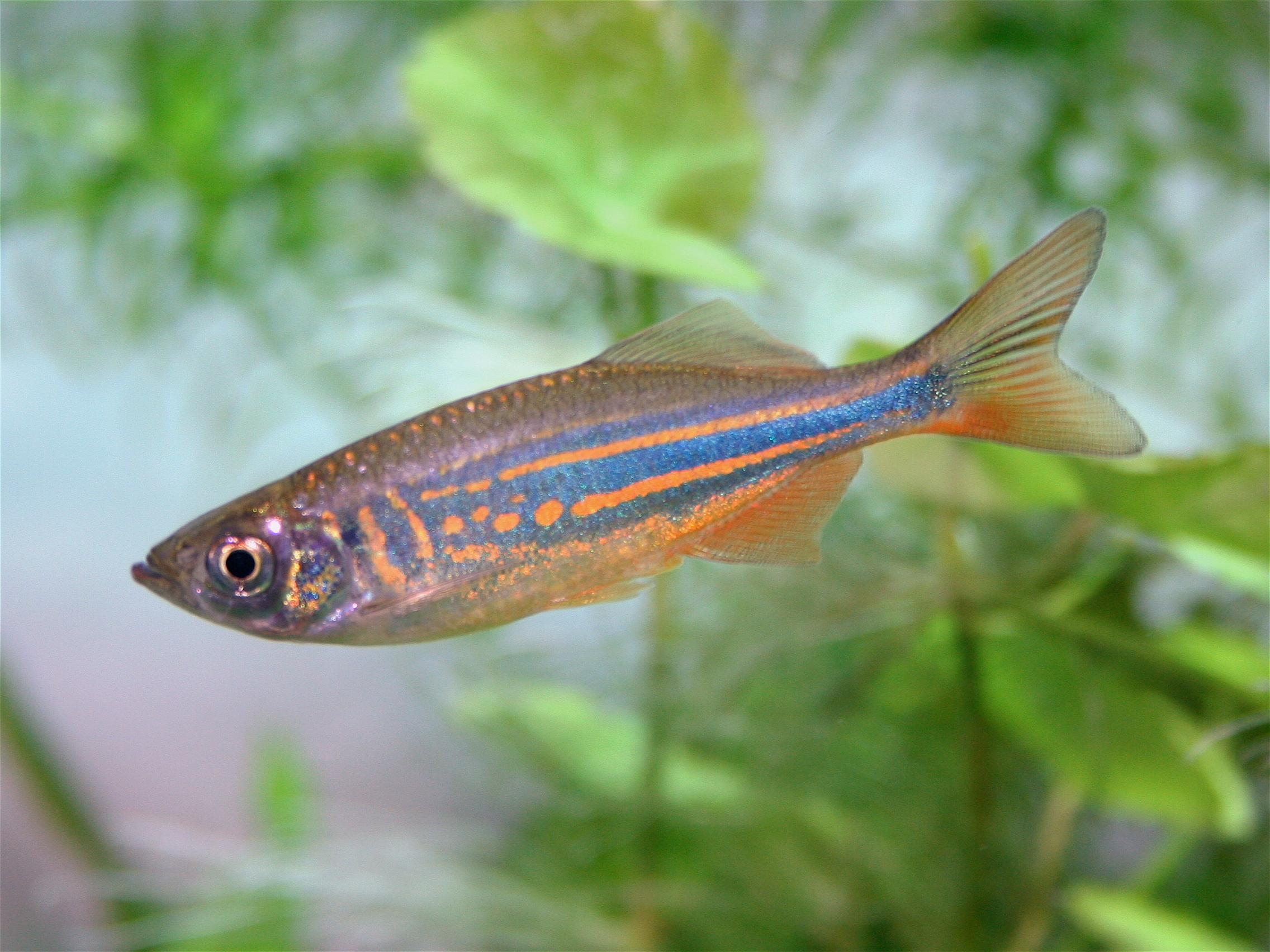 Giant Danio, Devario aequipinnatus